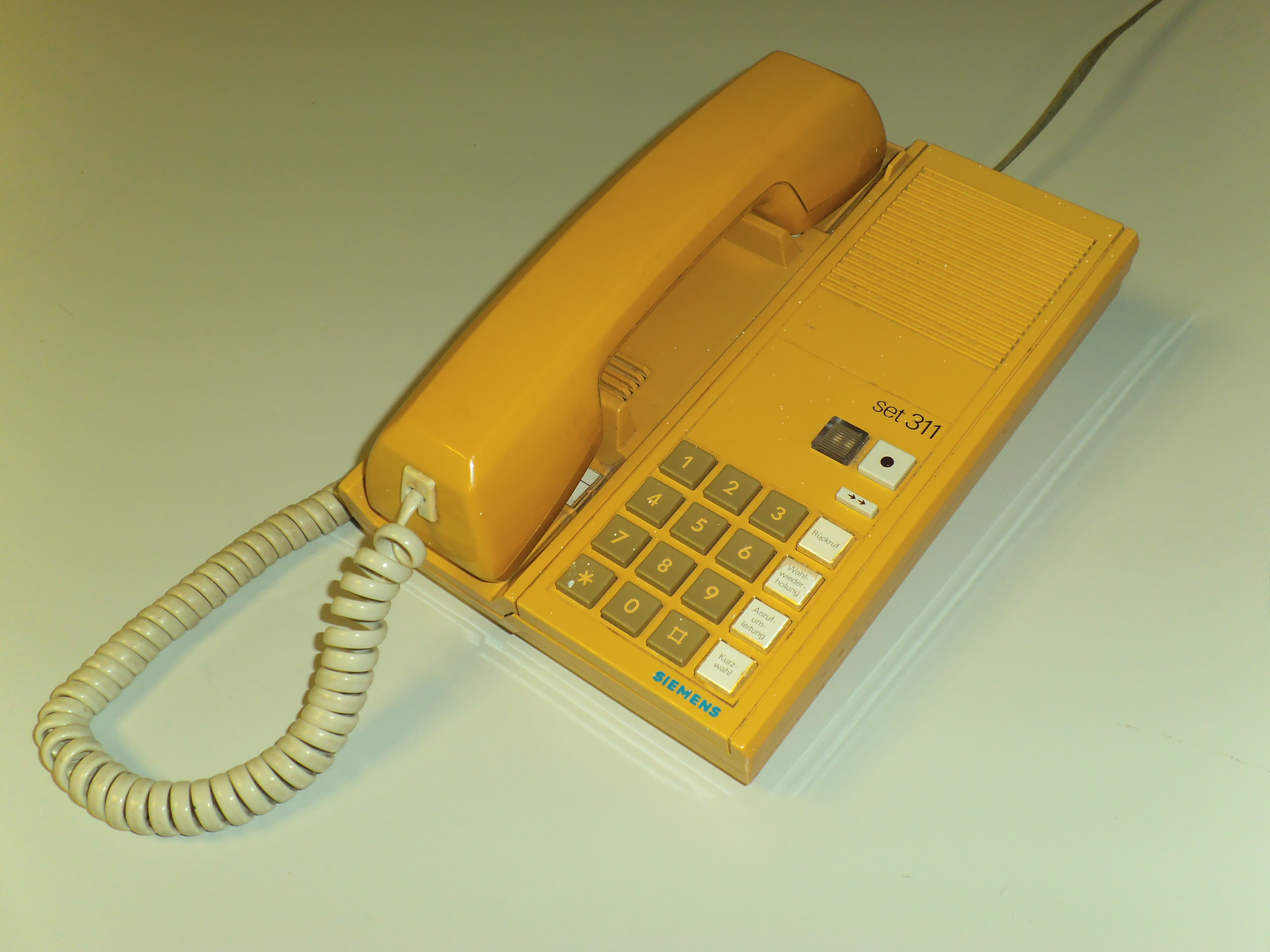 Siemens Set 311 P, Baujahr ca. 1990–1992, Ursprungsfarbe weiß